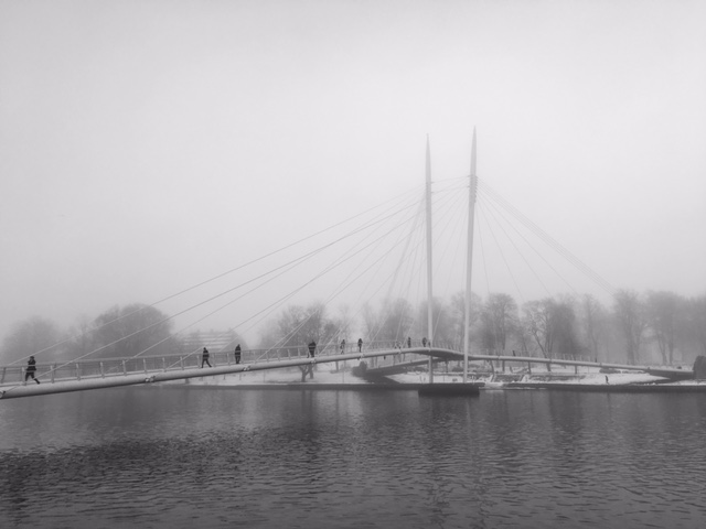 Ypsilon bru forbinder Union brygge med Bragernes